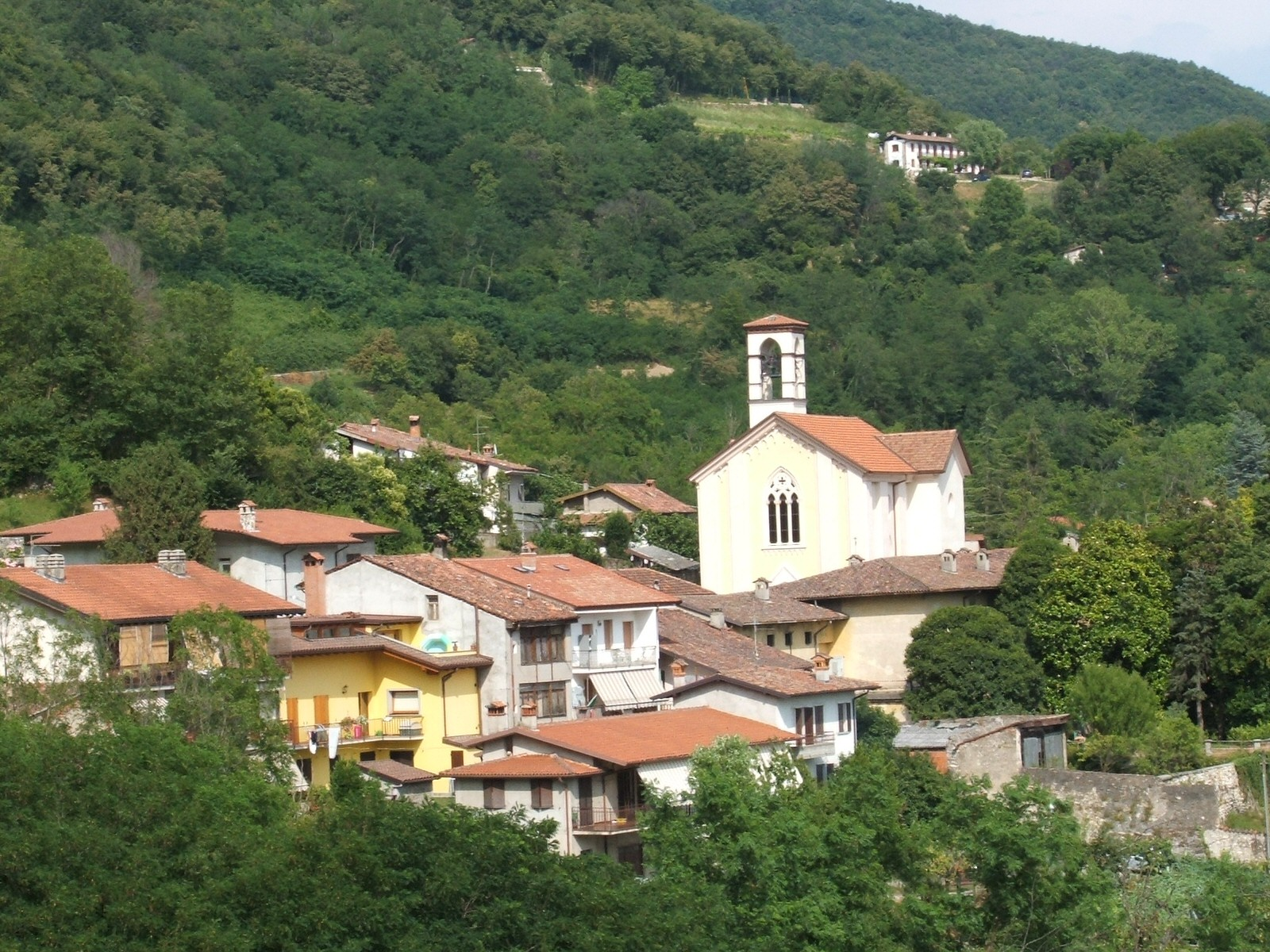 Cenate Sopra (BG), Lombardia, Italia - frazione sant'Ambrogio